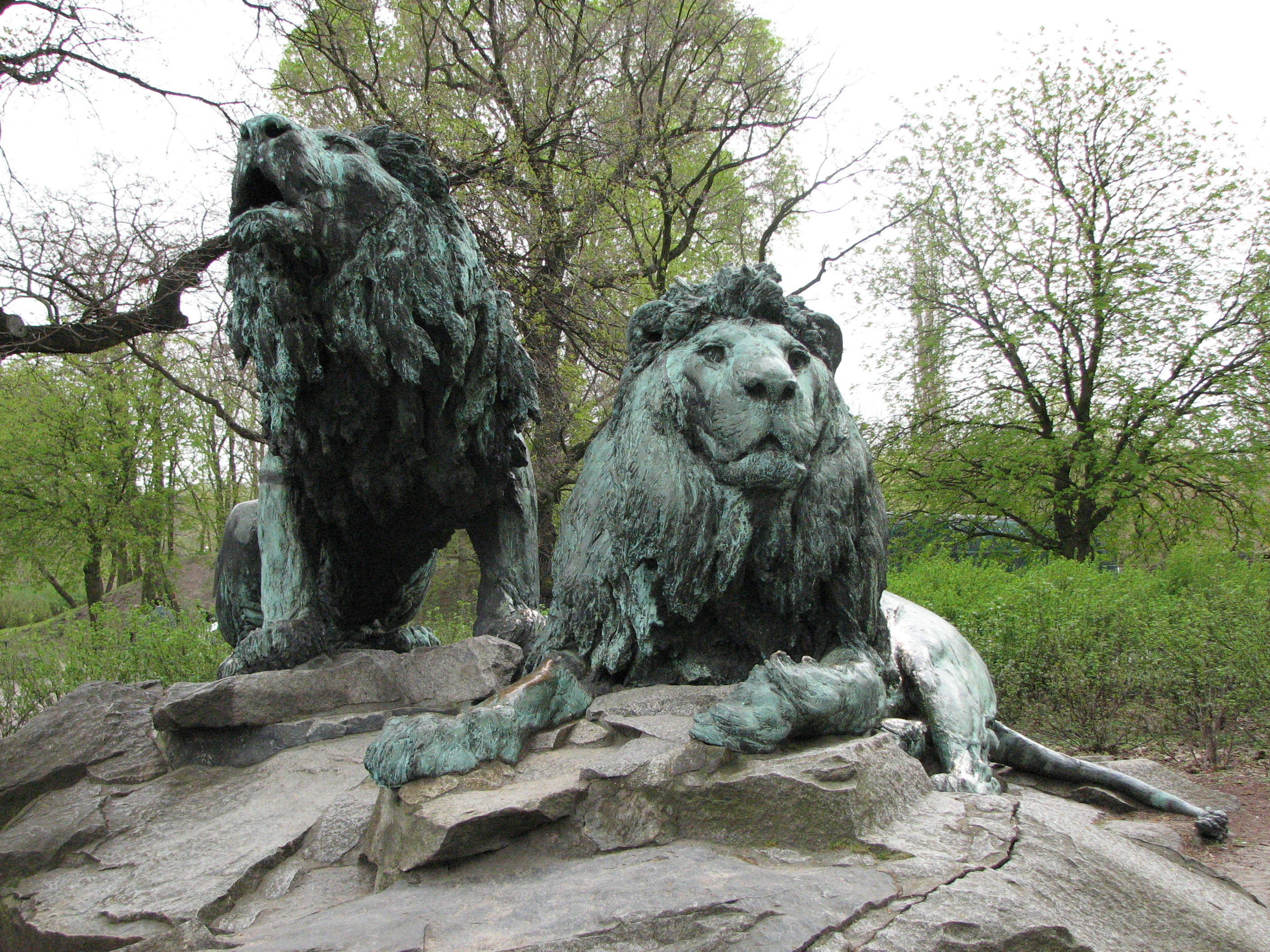 Löwenplastiken des ehemaligen Kaiser-Wilhelm-Nationaldenkmals geschaffen von den beiden Künstlern August Gaul und August Krauß im Tierpark Berlin